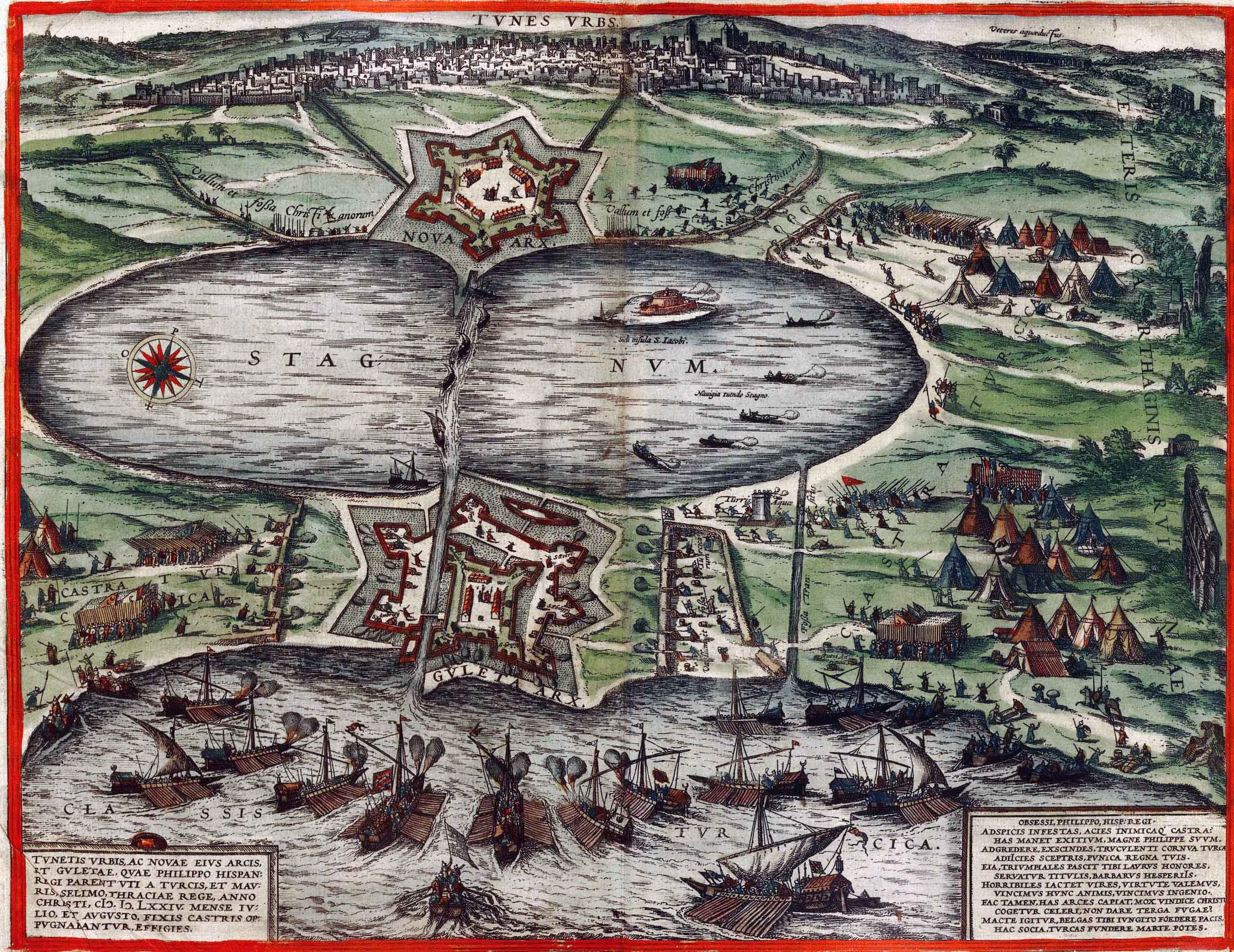 Carte par Braun & Hogenberg Bertrand Bouret